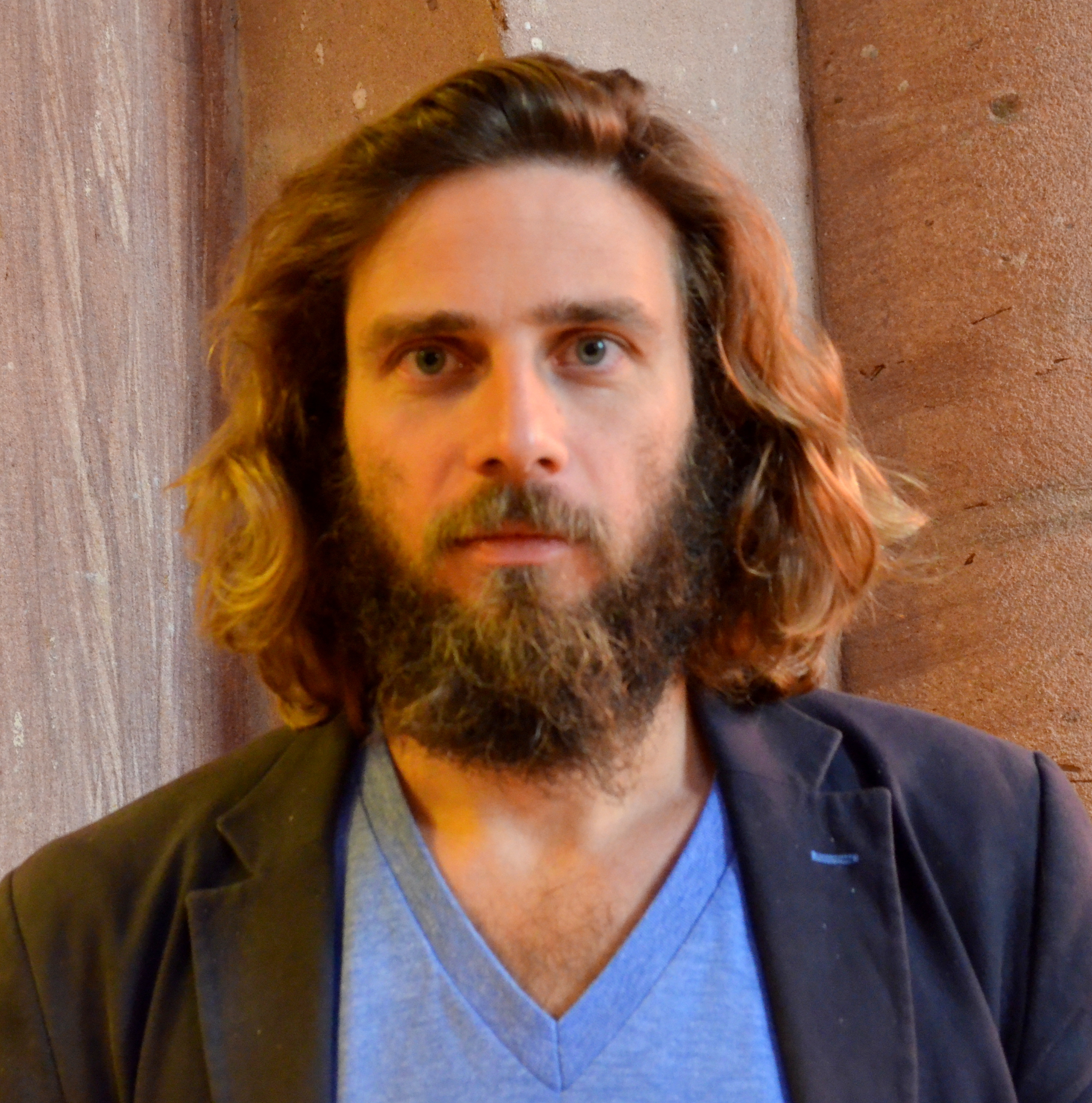 Festival international de géographie 2014. Personality rights warningAlthough this work is freely licensed or in the public domain, the person(s) shown may have rights that legally restrict certain re-uses unless those depicted consent to such uses. In these cases, a model release or other evidence of consent could protect you from infringement claims.